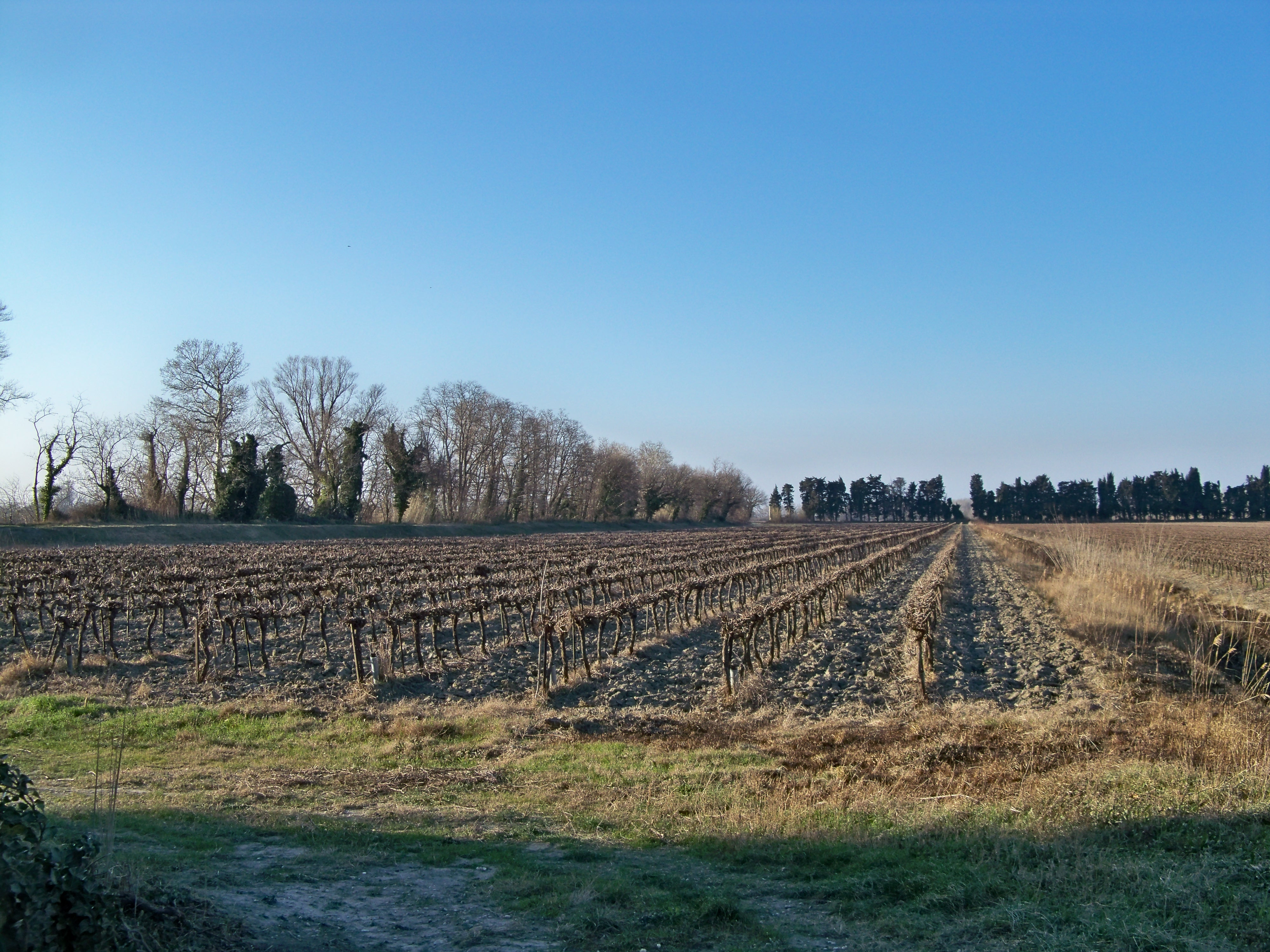 Domaine de l'Isle Saint Pierre, Mas de Thibert, commune d'Arles (13)